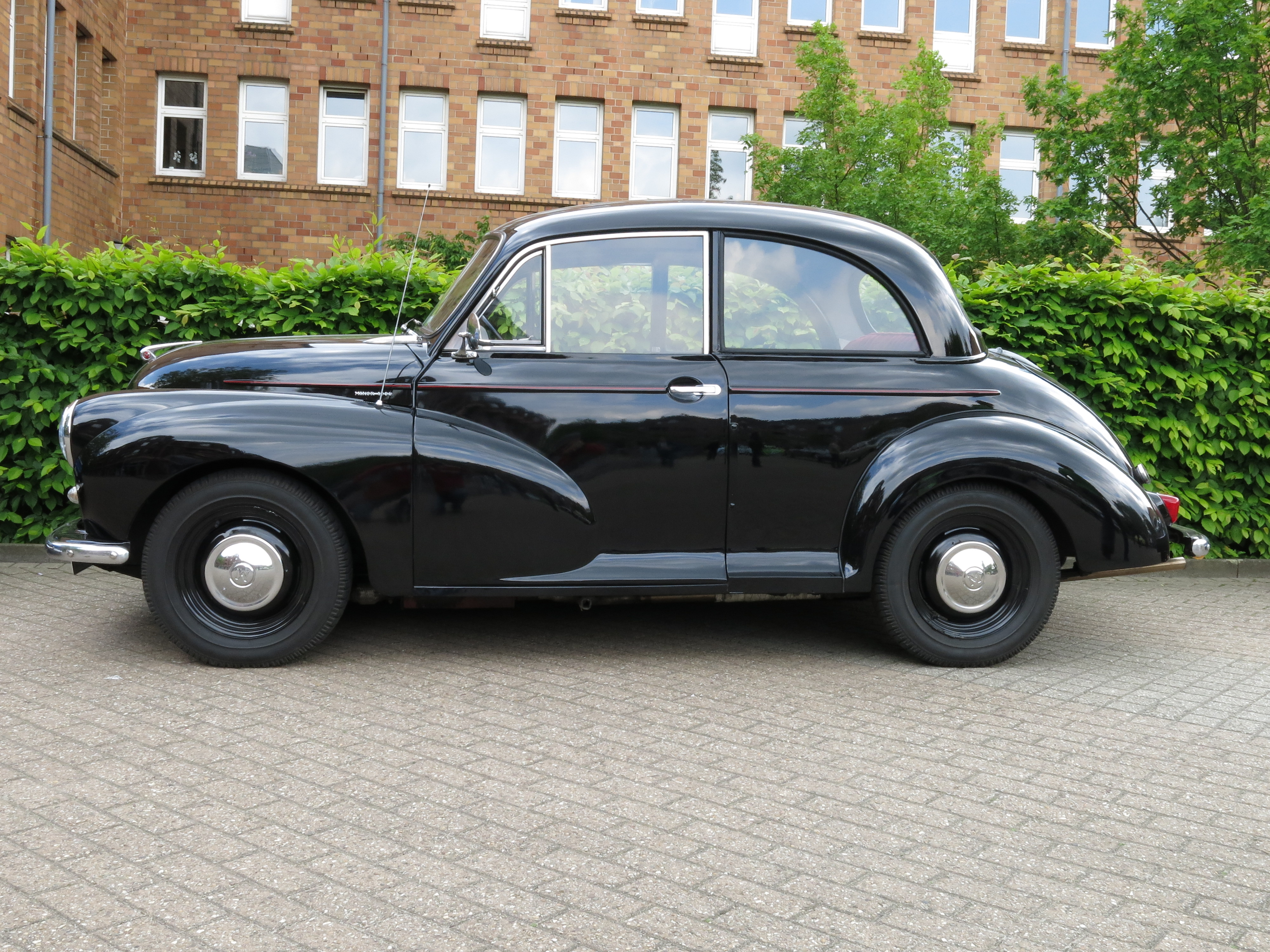 Morris Minor 1000